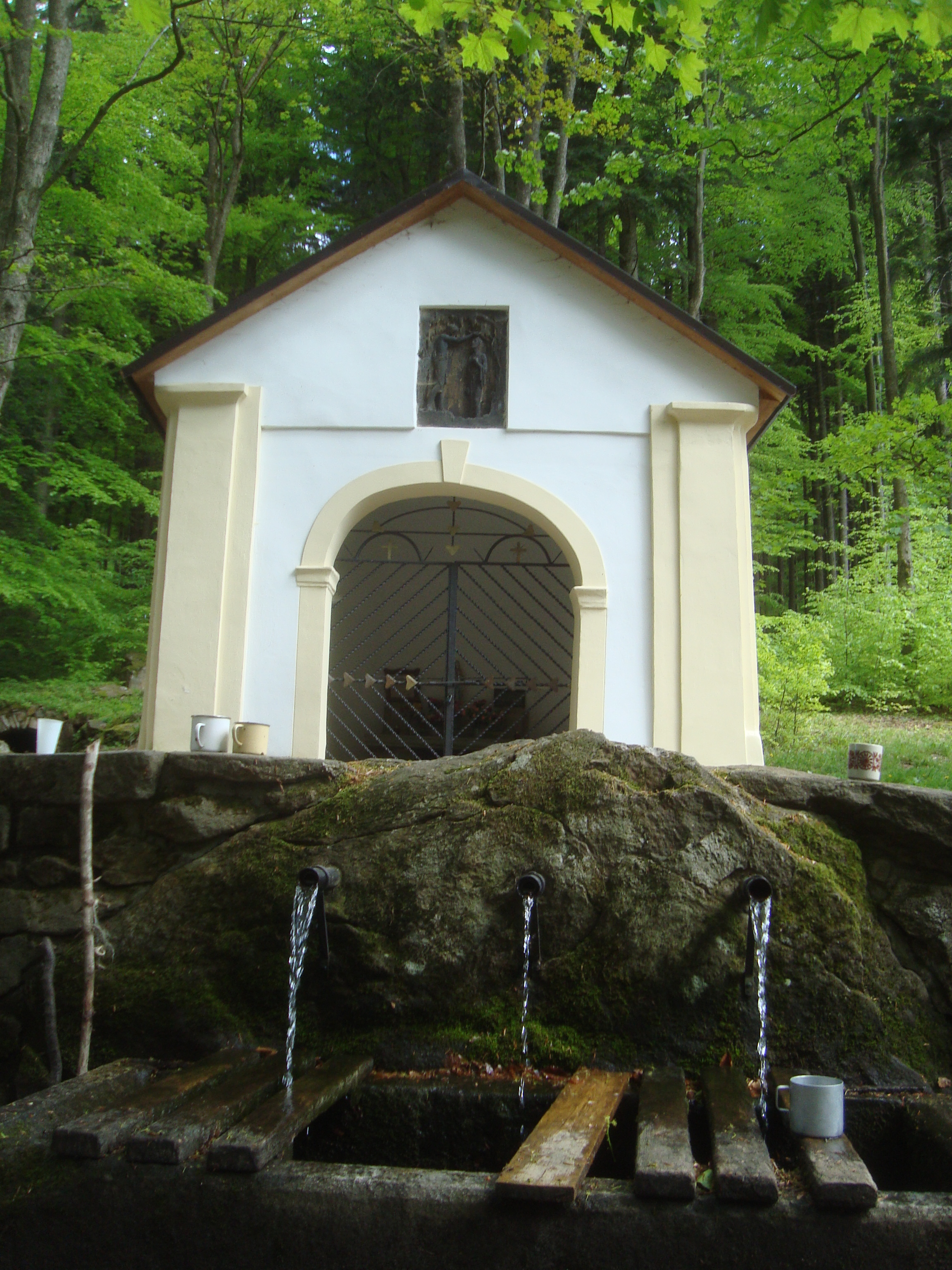 Zlatá studánka na Křemešníku s kaplí nad pramenem